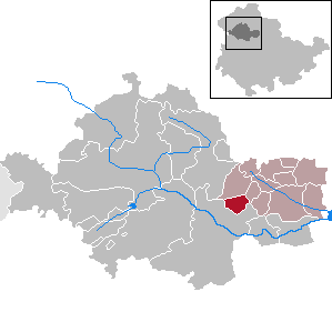 Sundhausen in Thuringia - Unstrut-Hainich-Kreis